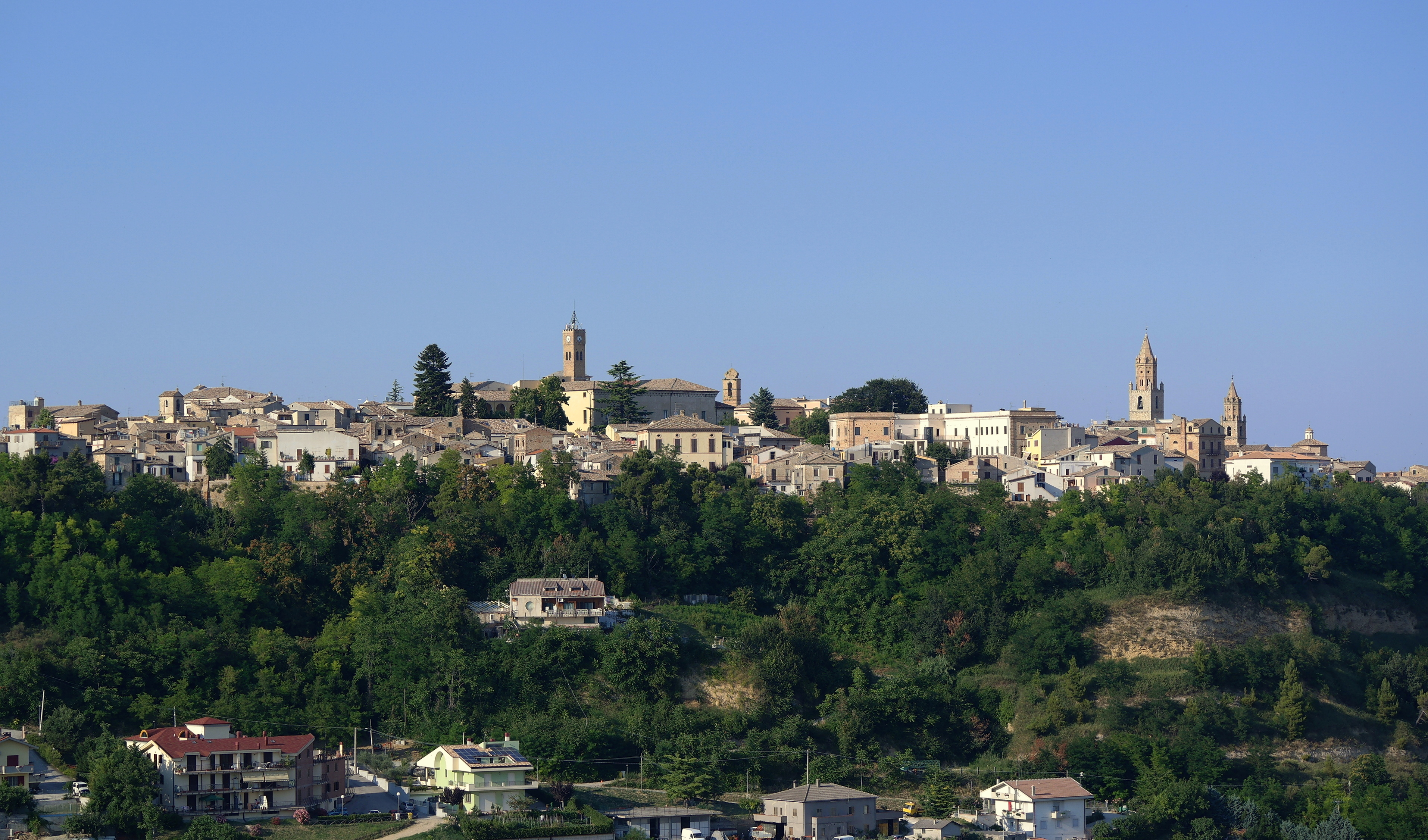 Panorama di Atri dal colle di giustizia